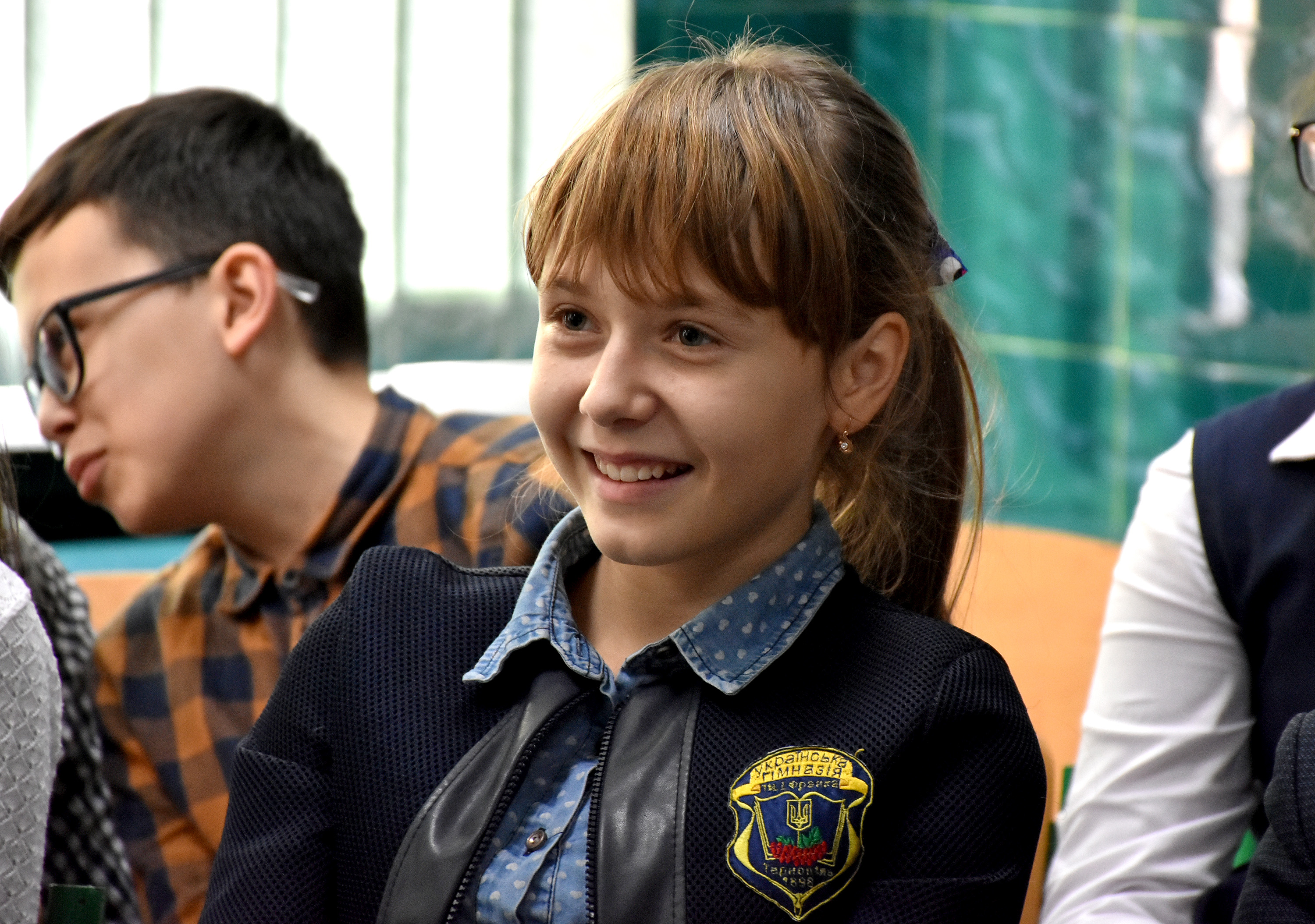 Майстер-клас гімназистам на кафедрі ортопедичної стоматології Тернопільського державного медичного університету імені І. Я. Горбачевського. Олеся Гасюк, учениця Тернопільської української гімназії імені І. Франка, телеведуча програми «Телевітамінки» на каналі ІНТБ.